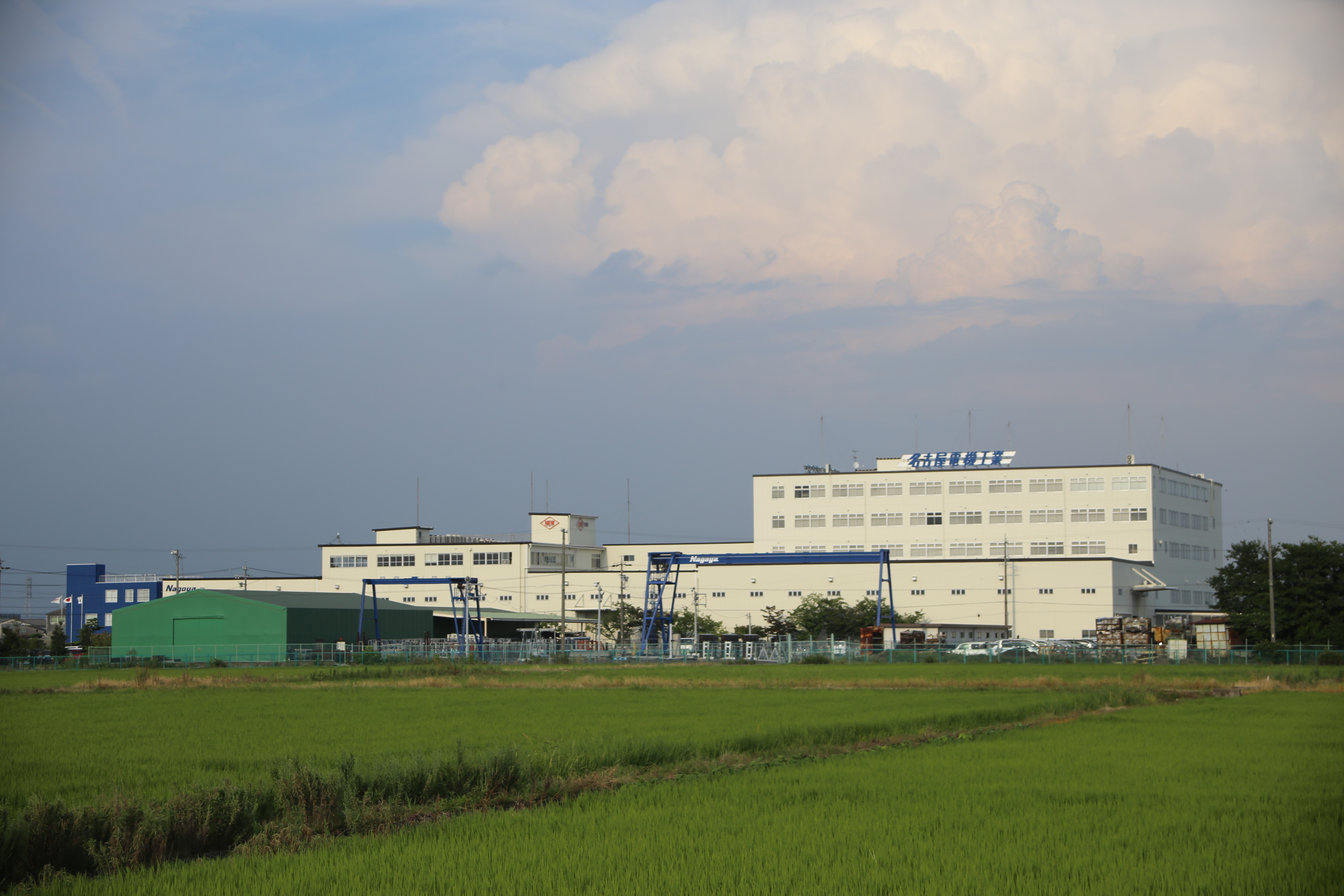 愛知県あま市篠田面徳の名古屋電機工業本社を西側公道南側より撮影